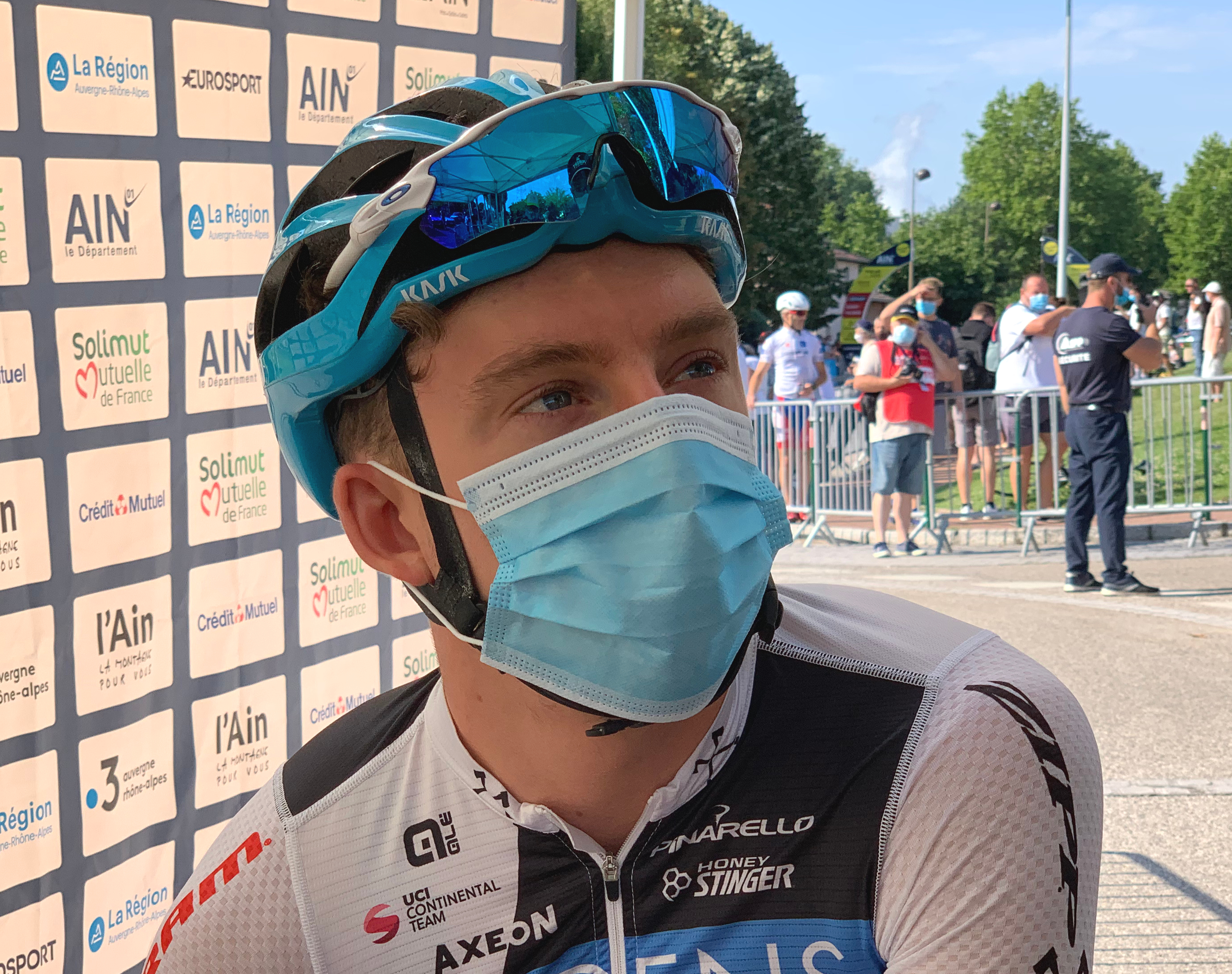 Kévin Vermaerke au départ de la troisième étape du Tour de l'Ain 2020.